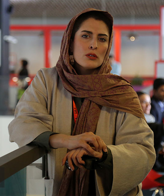 سی و ششمین جشنواره جهانی فیلم فجر